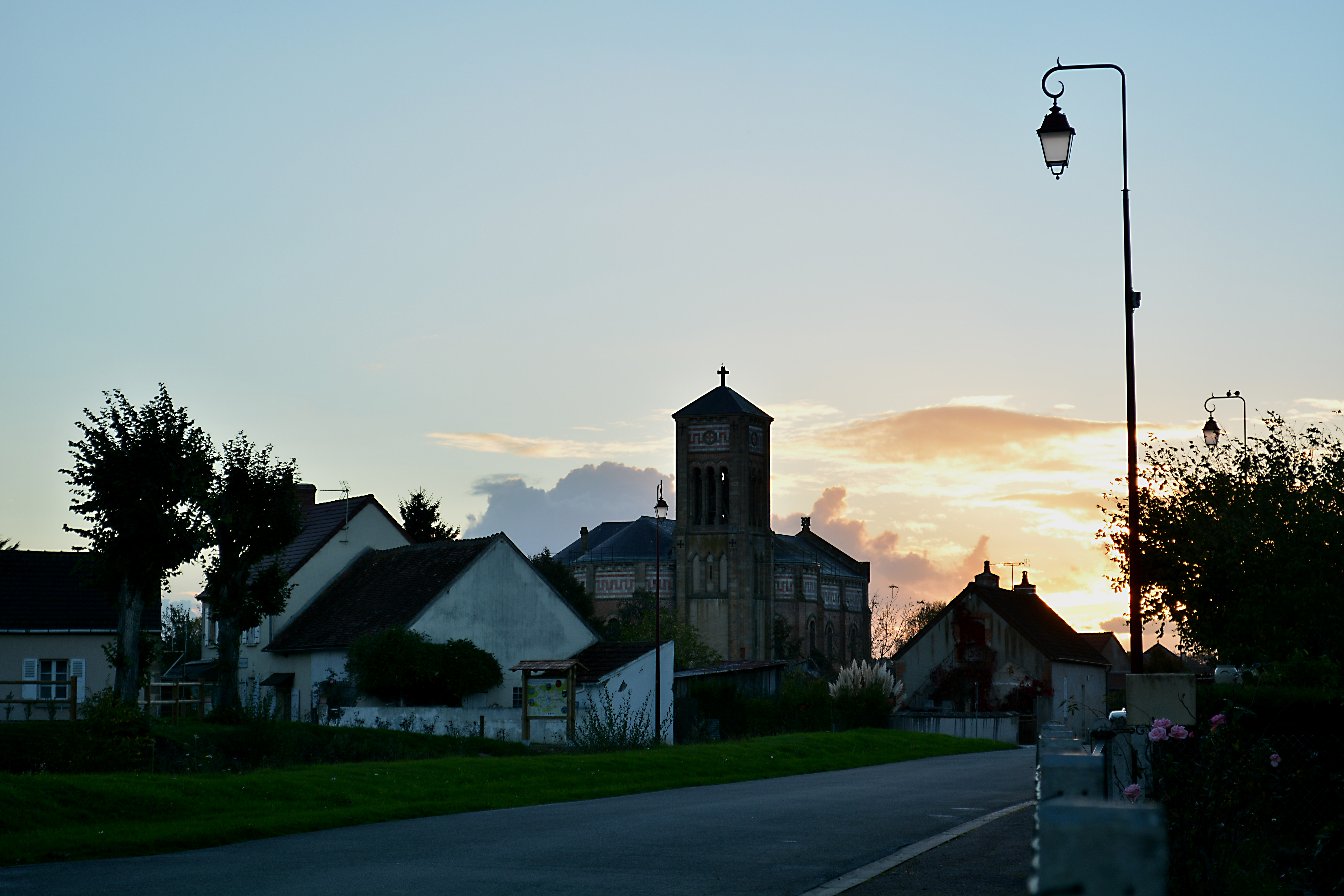 Cette photo est prise au soleil couchant.Nous voyons l'église qui a un style tout a fait particulier et qui est construite en briques rouges.